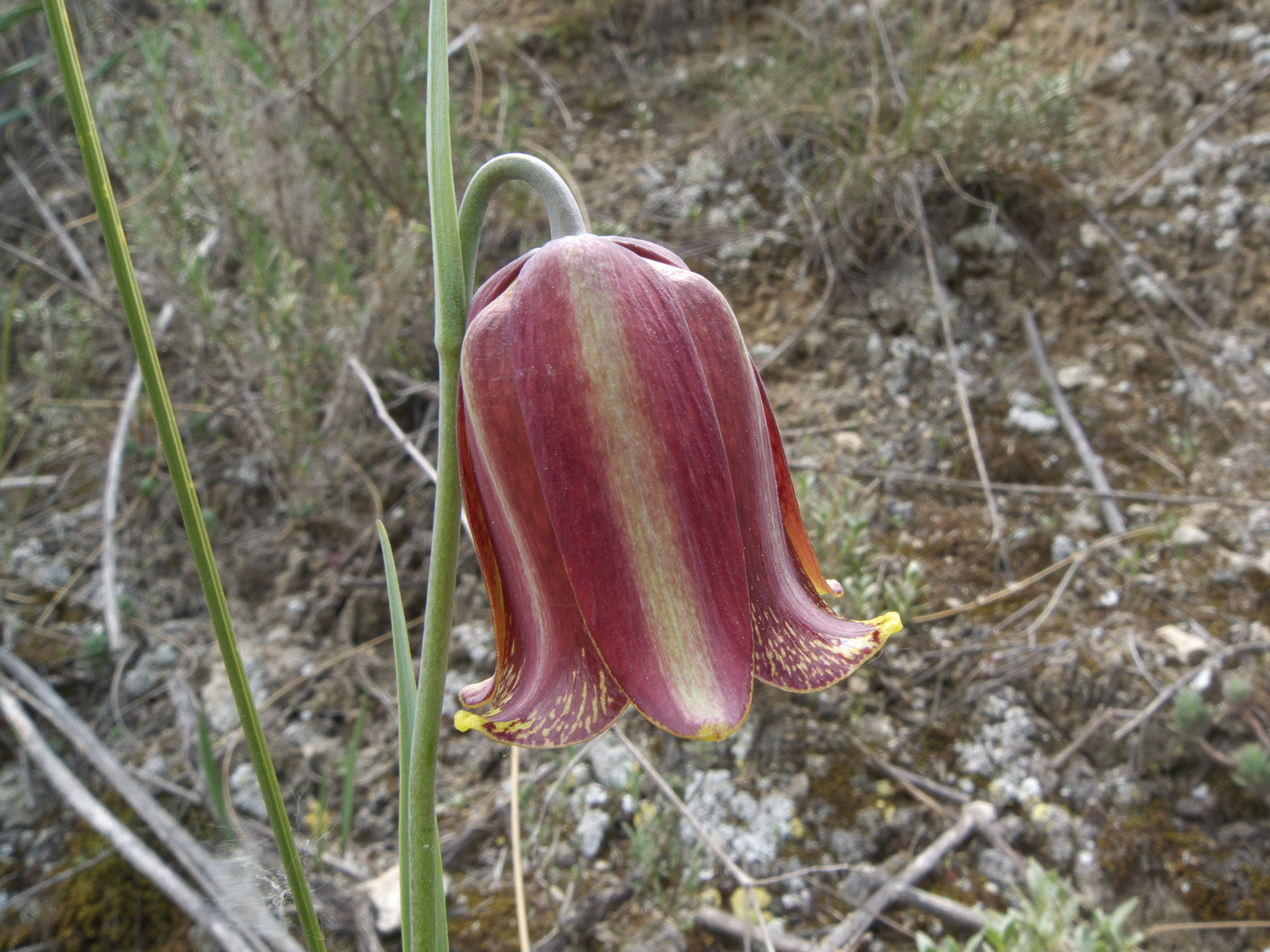 Flor de Fritillaria lusitanica (Liliaceae, Liliales). Rivas Vaciamadrid, Madrid, España.